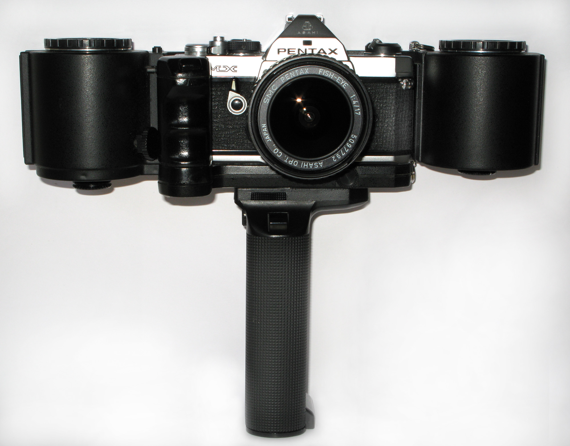 Pentax MX mit MotorDrive MX, Batteriegriff M, Langfilmmagazin MX und 1:4/17mm Objektiv